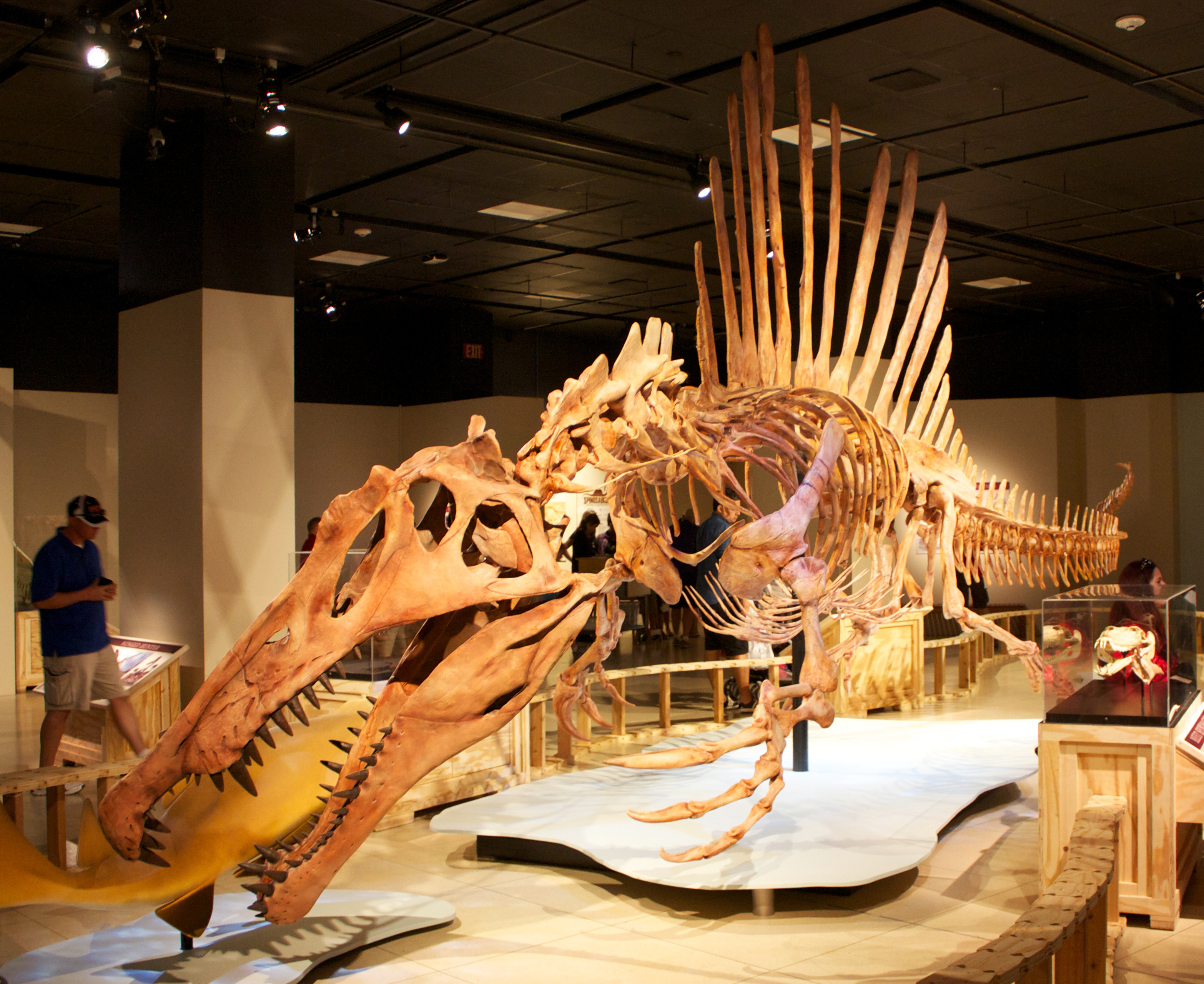 Spinosaurus